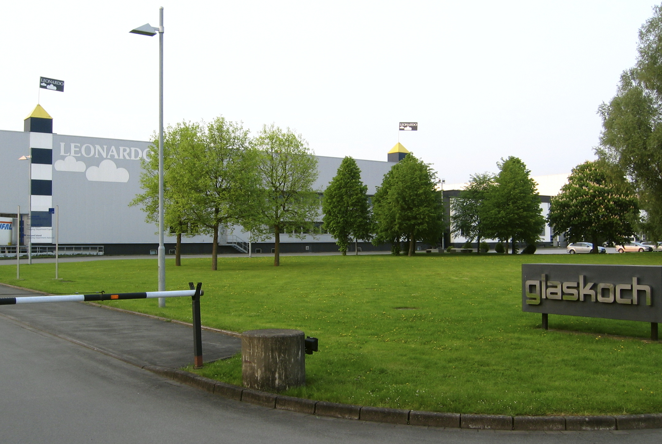 Eingang zum Glaskoch-Gelände („Leonardo“) in Herste, Bad Driburg, Nordrhein-Westfalen, Deutschland.